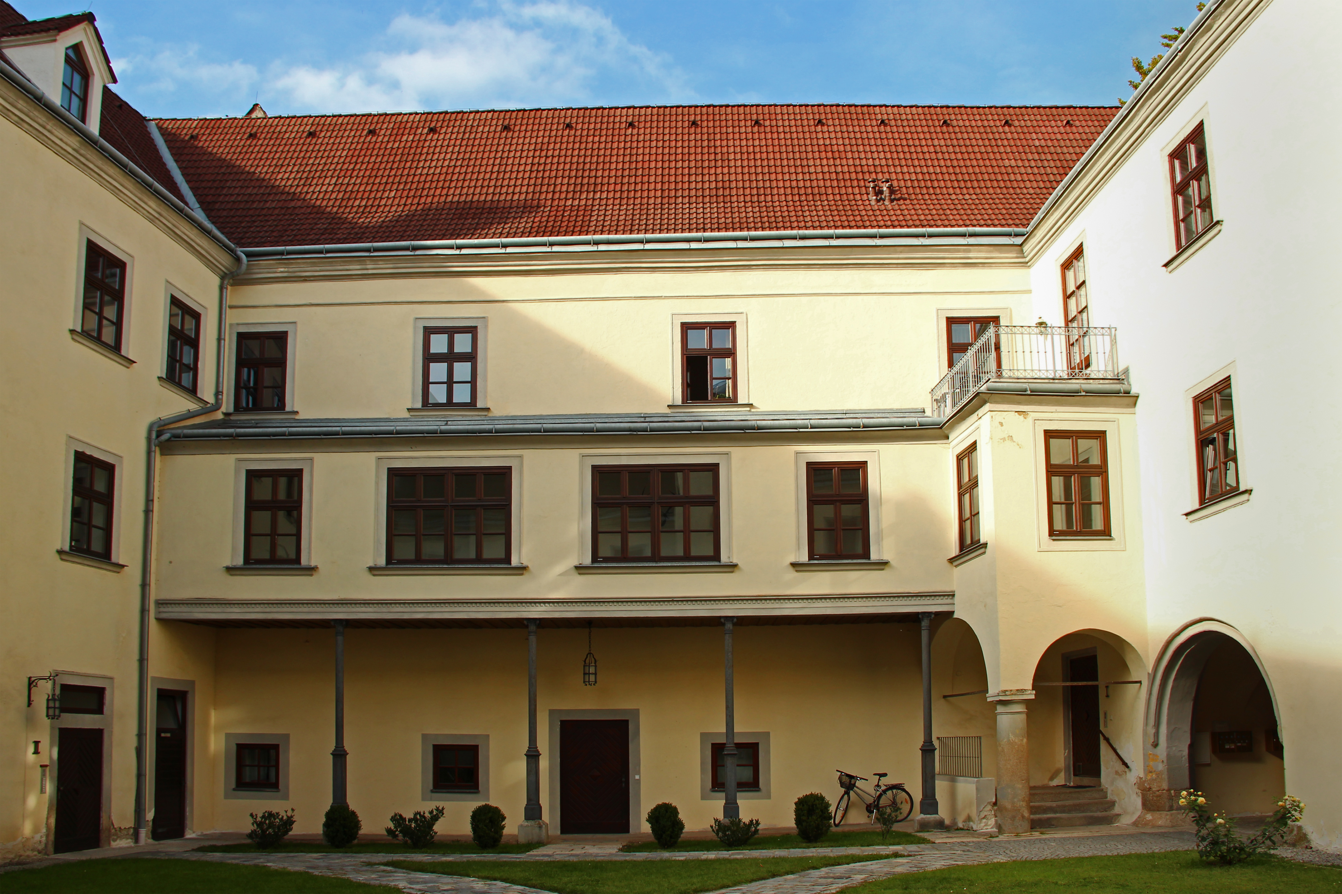 Gmünd - Denkmalpfad -Schloss Gmünd (Niederösterreich) - Innenhof Dieses Bild wurde anlässlich des österreichischen Tags des Denkmals 2012 in Niederösterreich eingereicht.